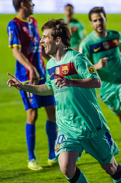 Lionel Messi. Nikon D7000 + Sigma 70-200mm f/2.8 Exposure 1/500 Aperture f/2.8 Focal Length 200 mm ISO Speed 1600